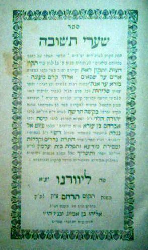 שער ספר שערי תשובה